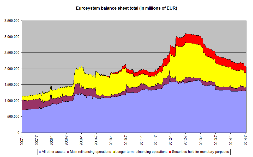 Verloop balanstotaal ECB van begin 2007 tot medio 2014; ingekorte versie van bestaande grafiek voor gebruik in Europese staatsschuldencrisis op :nl.